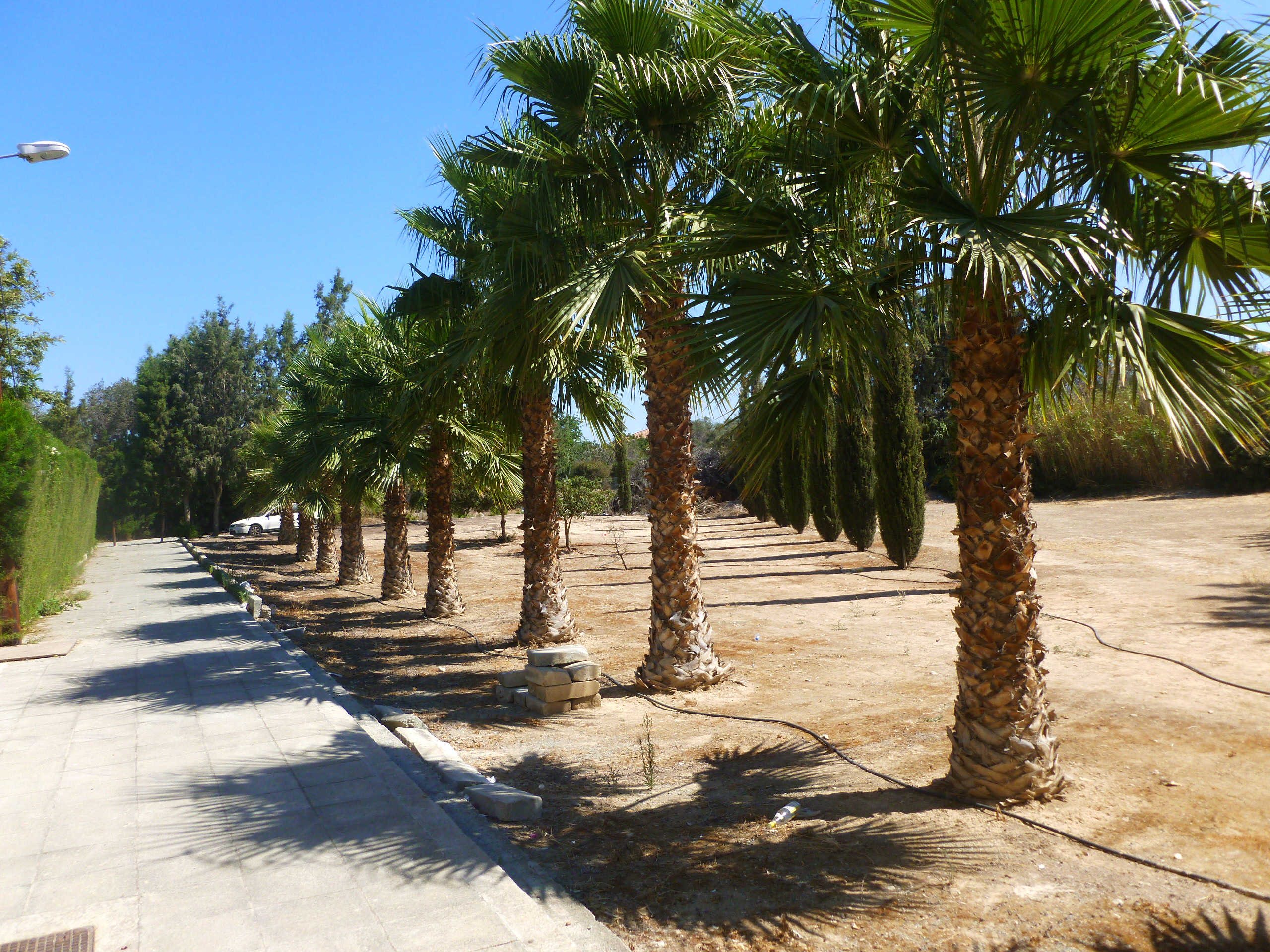 Agios Athanasios, Cyprus